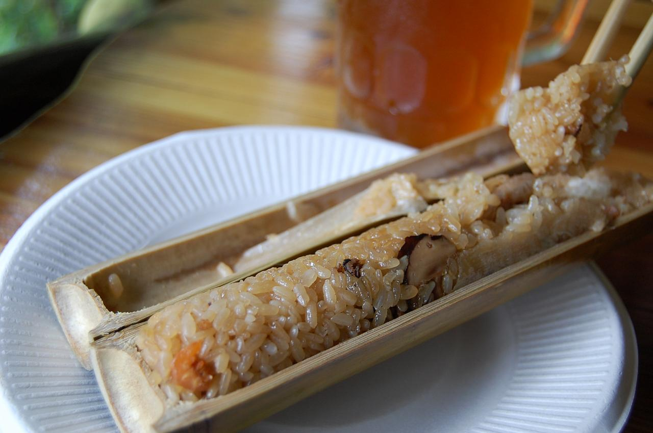 雲仙樂園竹筒飯。